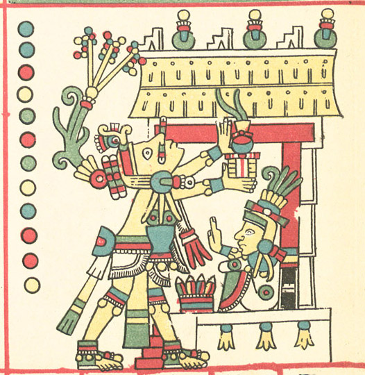 Cinteotl, dieu du maïs (Codex Fejérváry-Mayer, page 34)